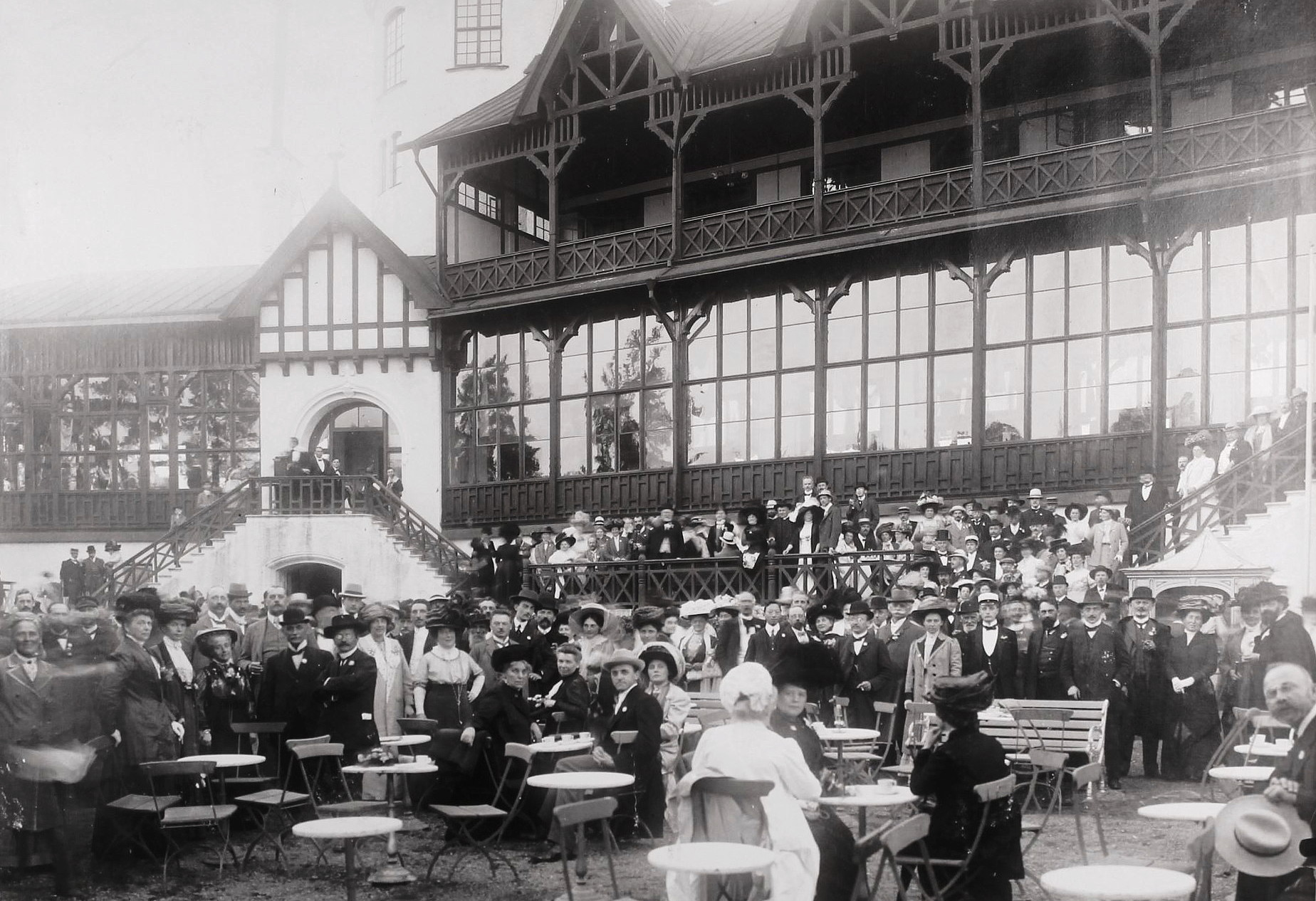 1910 hölls en världsfredskongress i Stockholm. Själva kongressen hölls i Riddarhuset men här är delegaterna ute i Saltsjöbaden på Grand Restaurant på Restaurantholmen.